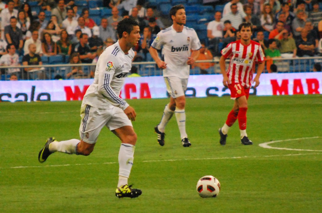 Cristiano Ronaldo lors d'un match entre le Real Madrid et l'UD Almería.